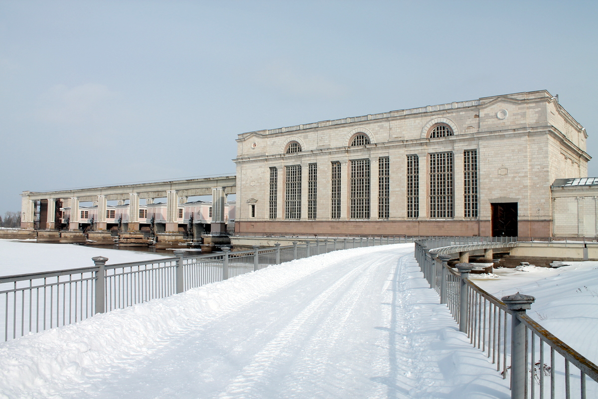 Угличская ГЭС